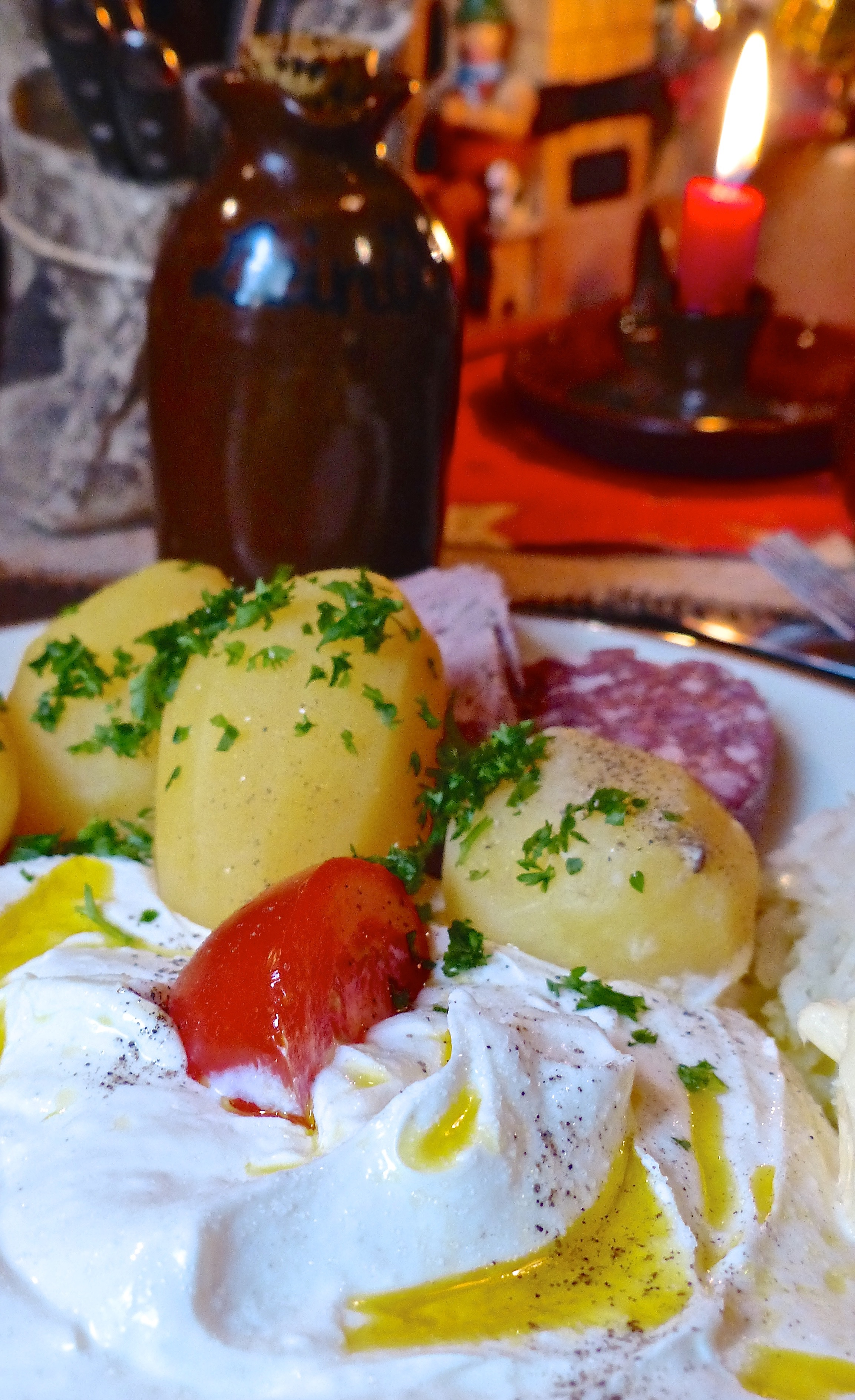 Quark mit Leinöl, Leberwurst und Blutwurst - traditionelles Weihnachtsessen im Erzgebirge, Dörnthaler Ölmühle